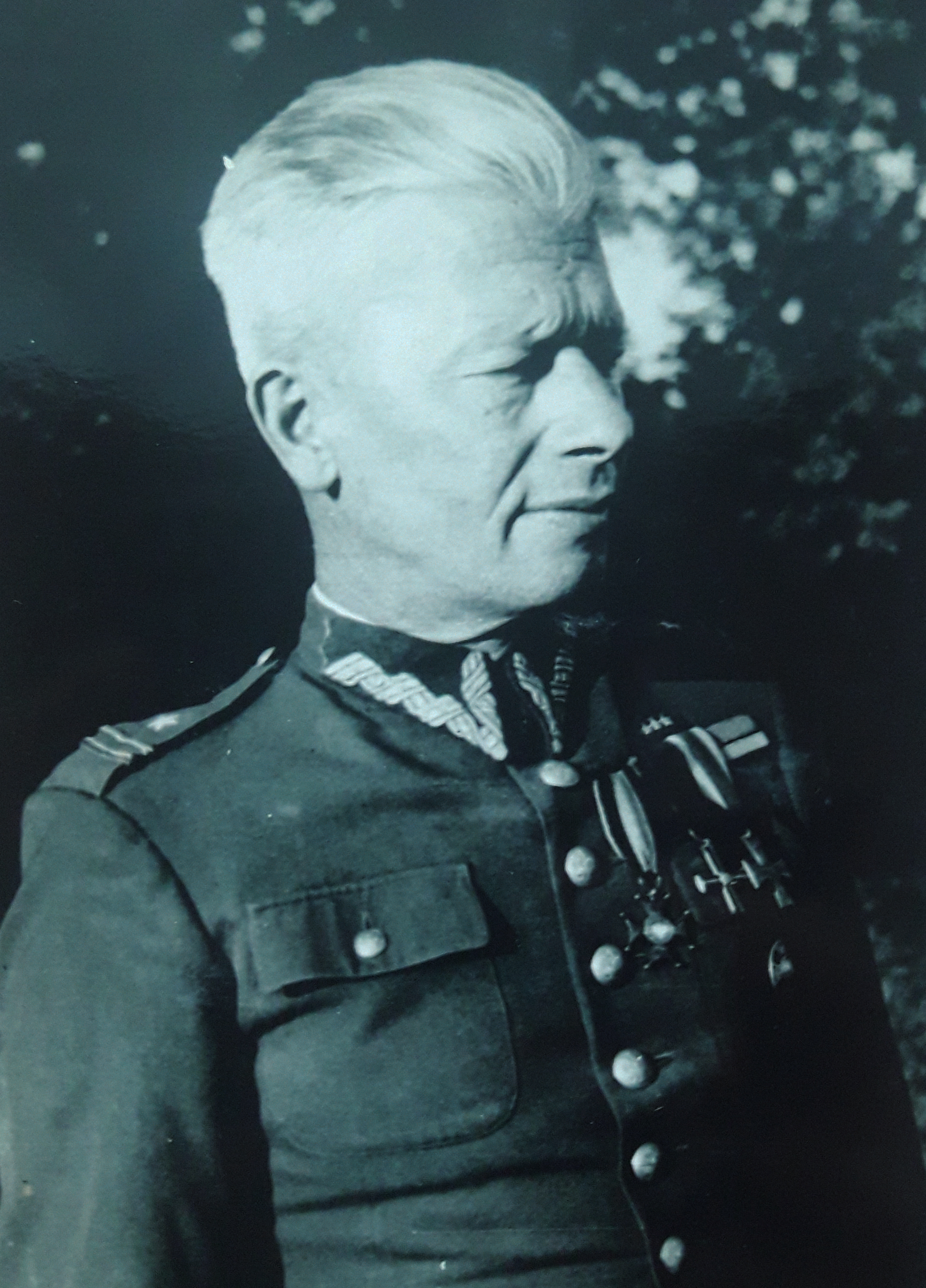 major Mieczysław Piotr Barys, żołnierz I Brygady Legionów Piłsudskiego, z Odznaką Honorową I Brygady Legionów na mundurze. Ojciec kapitana Stanisława Barys. Zdjęcie udostępnił ze swoich zbiorów prawnuk, Rafał Barys. To samo zdjęcie zostało udostępnione w lipcu 2019 roku Archiwum Narodowemu w Krakowie oddział w Nowym Sączu